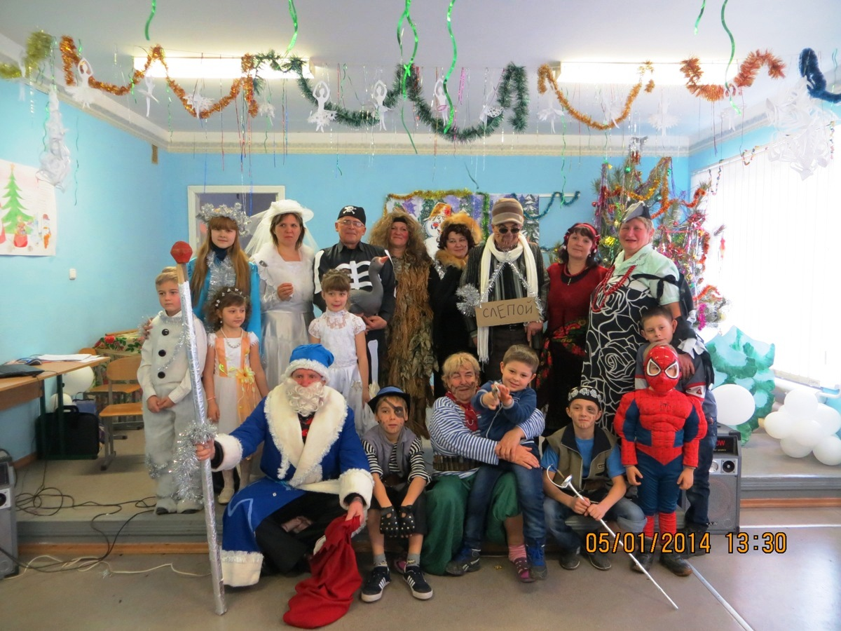 2014 ДИТЯЧЕ СВЯТО